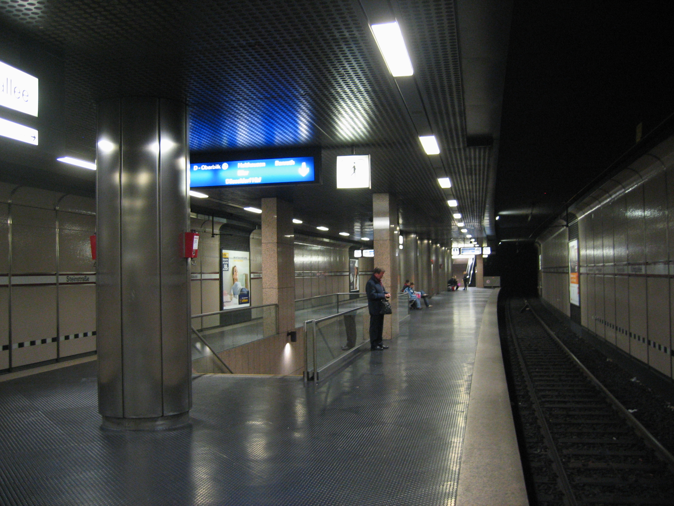 Stadtbahn Düsseldorf, U-Bahnhof Steinstraße/Königsallee